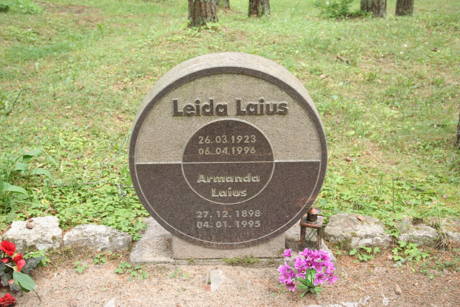 Leida Laiuse haud Pärnamäe kalmistul.